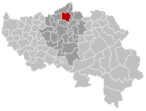 Gemeentekaart, eigen werk